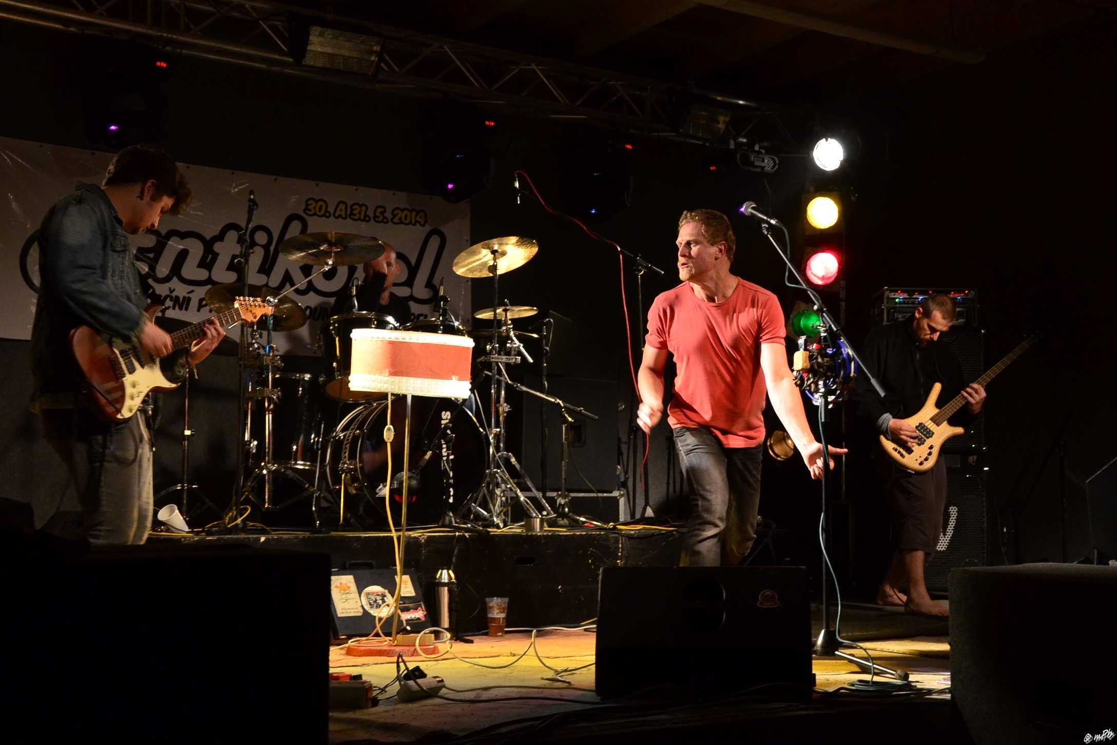 I v roce 2014 vystoupili 30.5. Sněhuláci (lounsko - ústecká kapela Sníh na schodišti) na již 10. ročníku Antikotle na lounském Bahně.